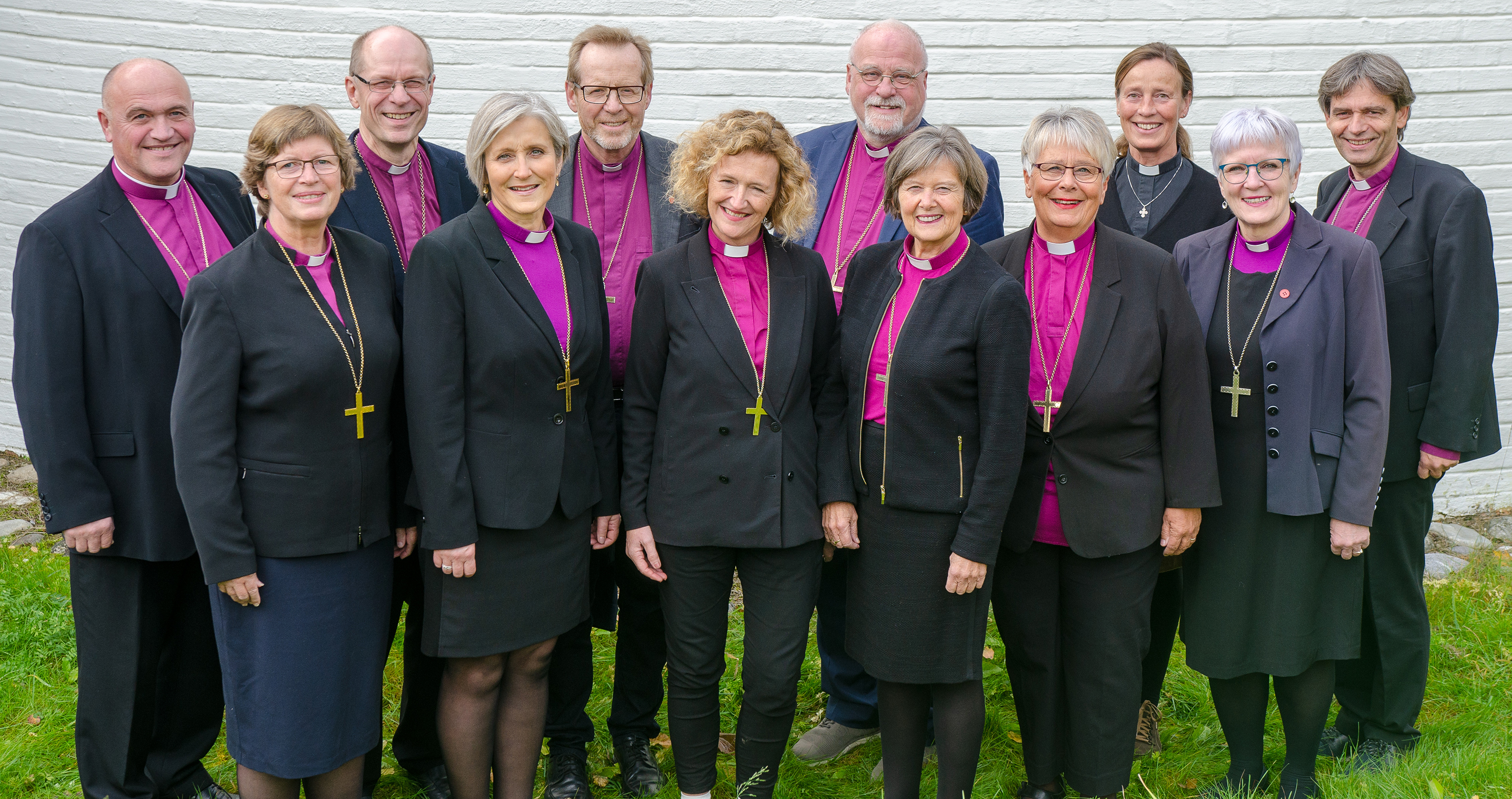 Den norske kirkes biskoper, oktober 2018. Bak fra venstre: Jan Otto Myrseth (Tunsberg), Olav Øygard (Nord-Hålogaland), Halvor Nordhaug (Bjørgvin), Atle Sommerfeldt (Borg), Anne-Lise Åndøy (Da domprost, nå biskop Stavanger), Stein Reinertsen (Agder og Telemark) Framme fra venstre: Ingeborg Midtømme (Møre), Herborg Finnset (Nidaros), Kari Veiteberg (Oslo), Helga Haugland Byfuglien (preses), Solveig Fiske (Hamar), Ann-Helen Fjeldstad Justnes (Sør Hålogaland)